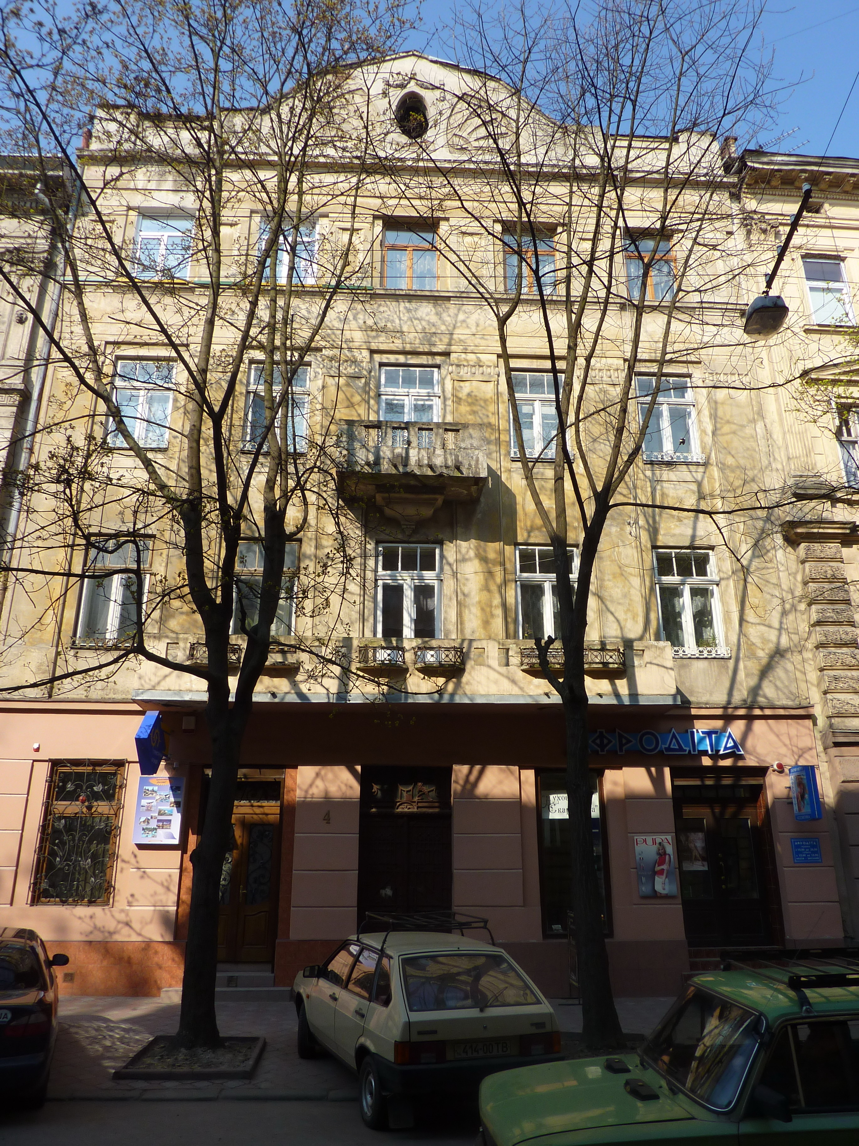 Kamienica we Lwowie przy ul. Brajerowskiej 4, w której na 2 piętrze mieszkał wraz z rodzicami Stanisław Lem. Kiedy było ciepło, okupowałem mały balkon kamienny, na który wychodziło się z gabinetu ojca ("Wysoki Zamek")